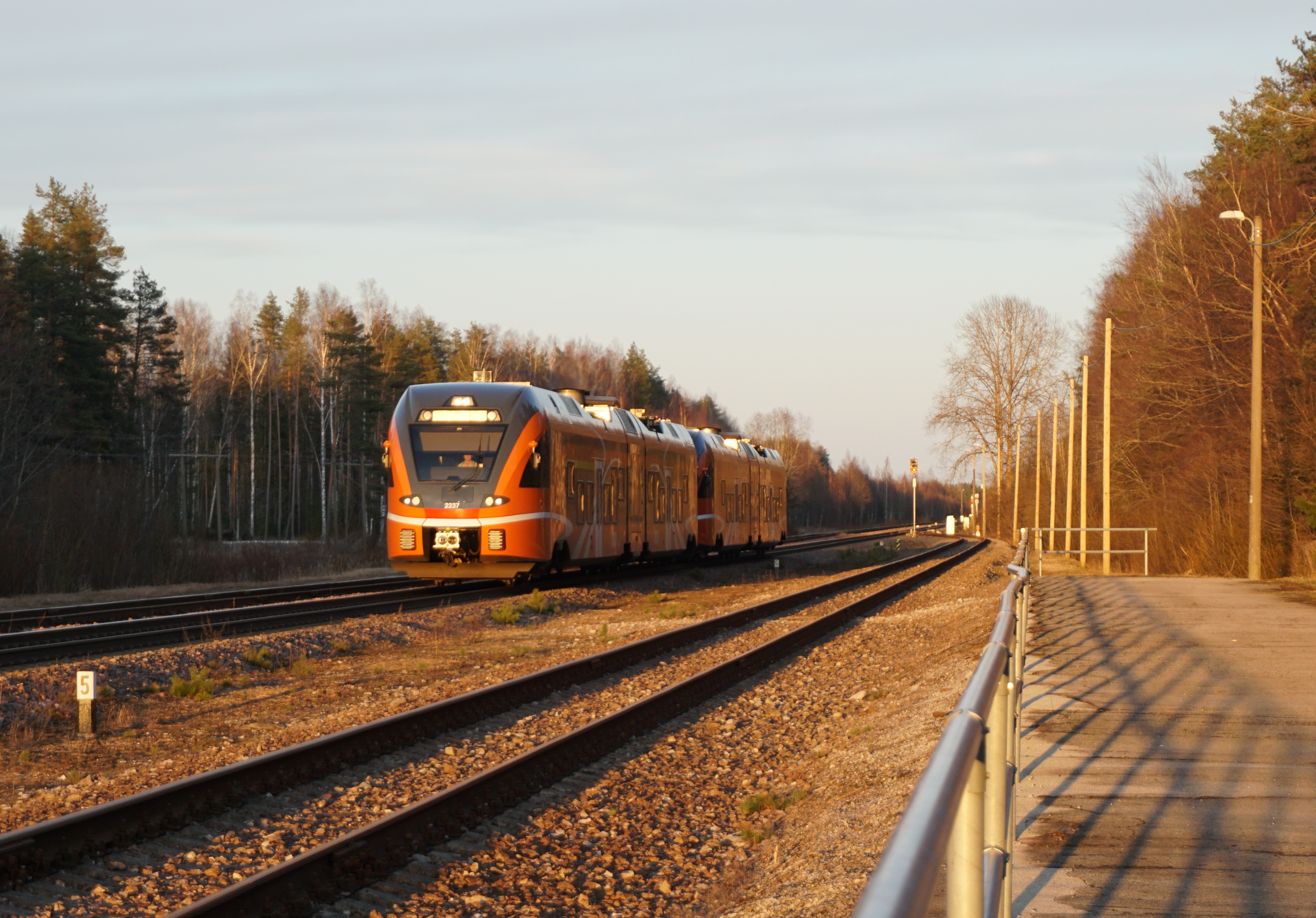 Elroni diiselrong saabumas Oru jaama